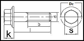 ISO 4162